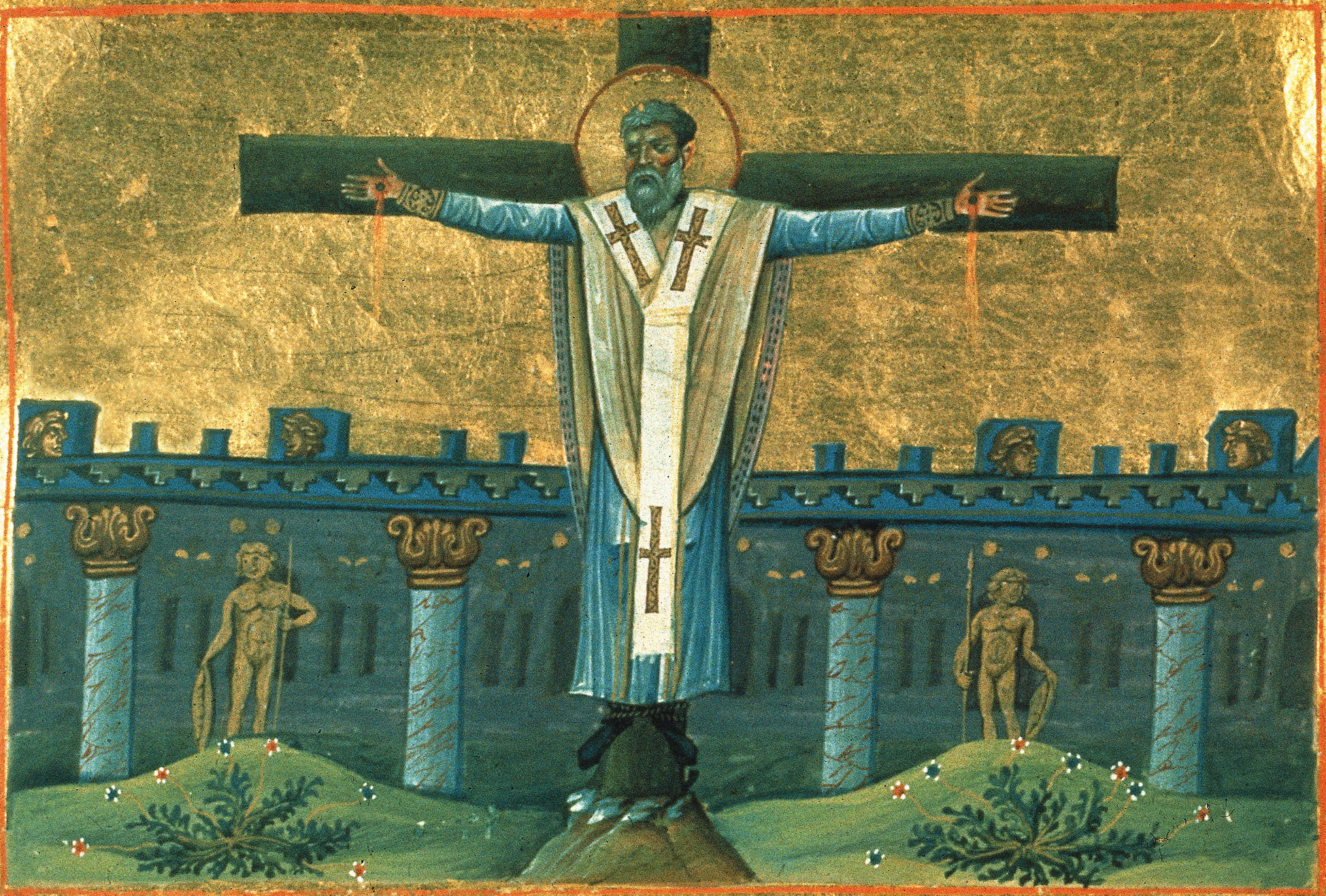 Менологий Василия II. Мученичество св. Симеона